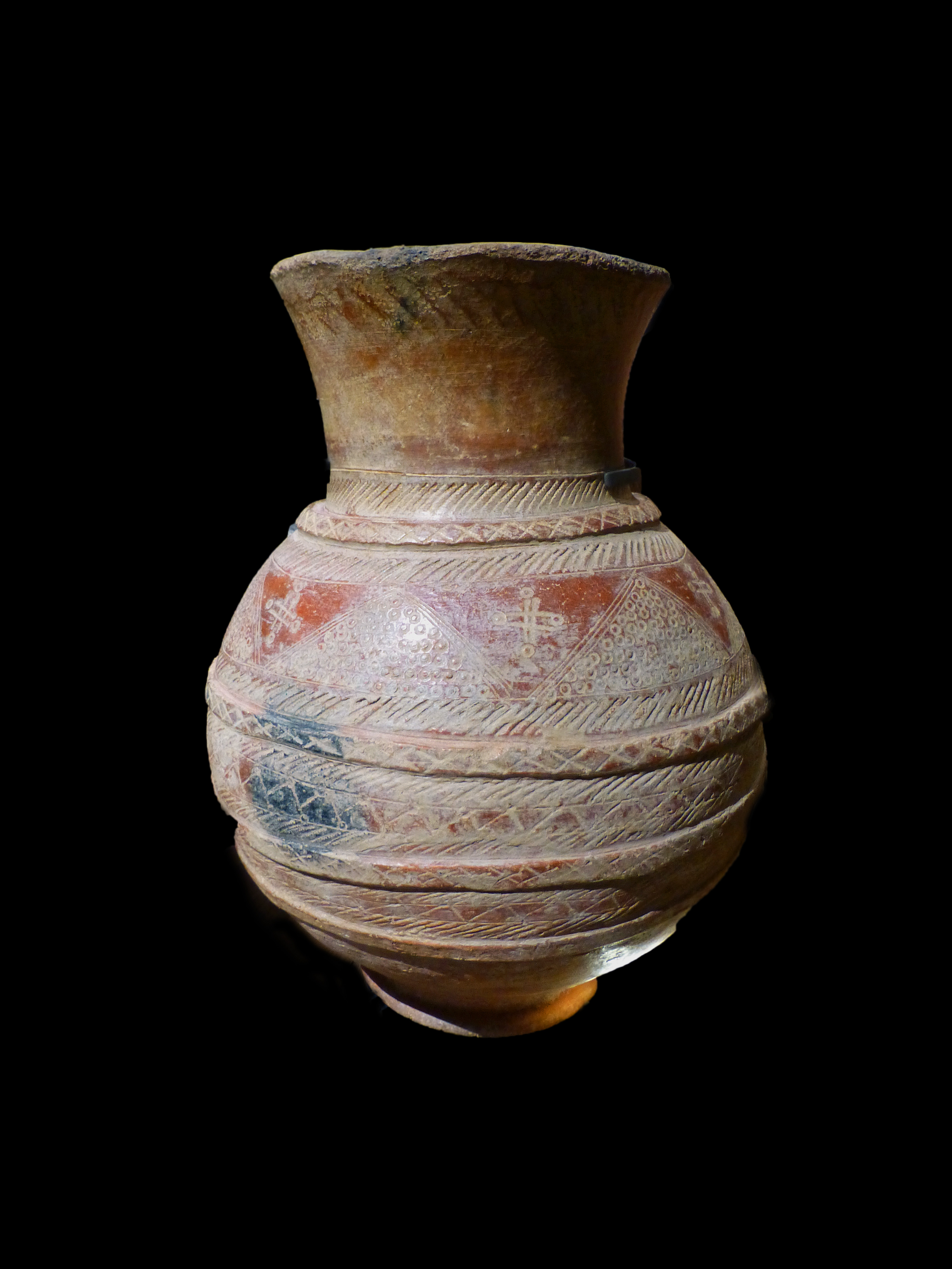 Jarre en terre cuite. Population Bozo-Somono. Mopti, Mali. XXe siècle. Traditionnellement offerte à la mariée pour orner sa chambre. Lyon. Musée des Confluences.